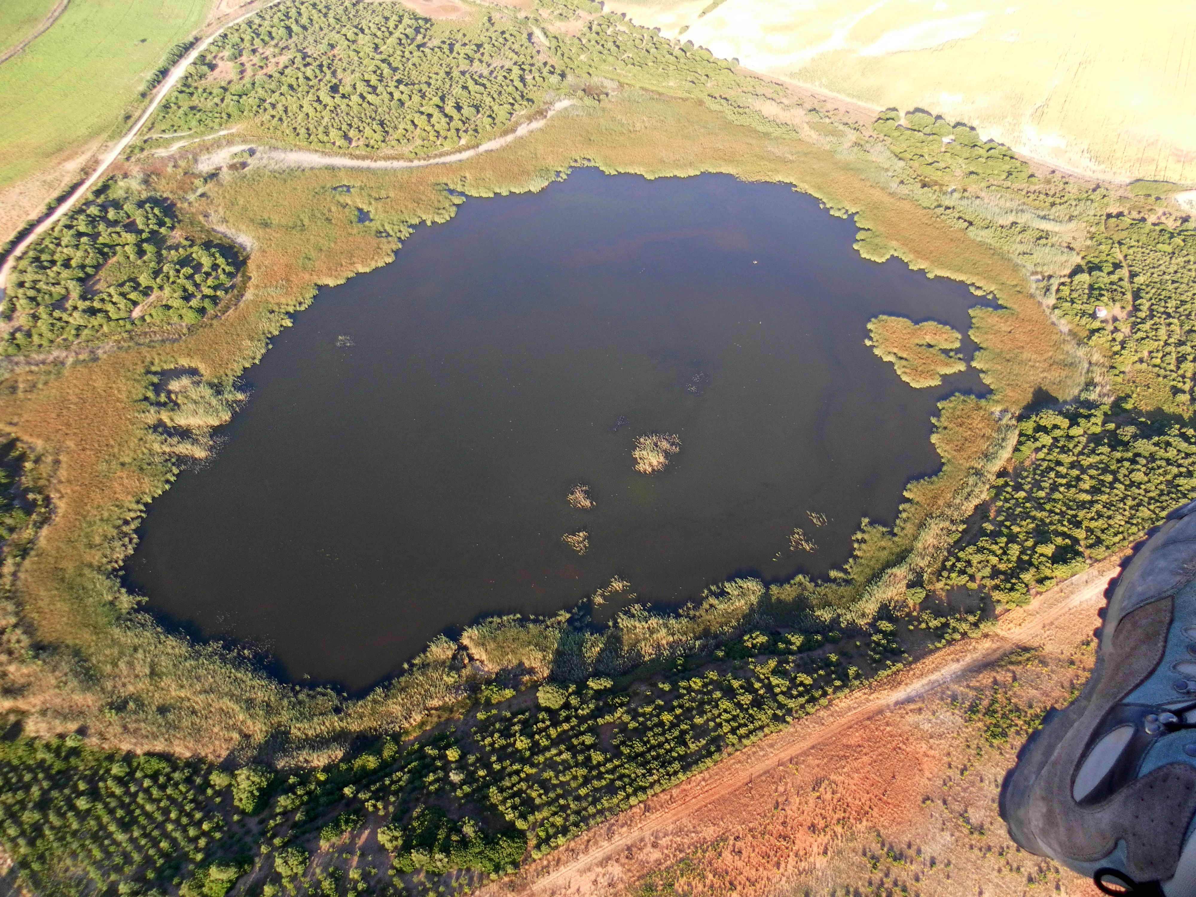 Aerea Laguna del Taraje